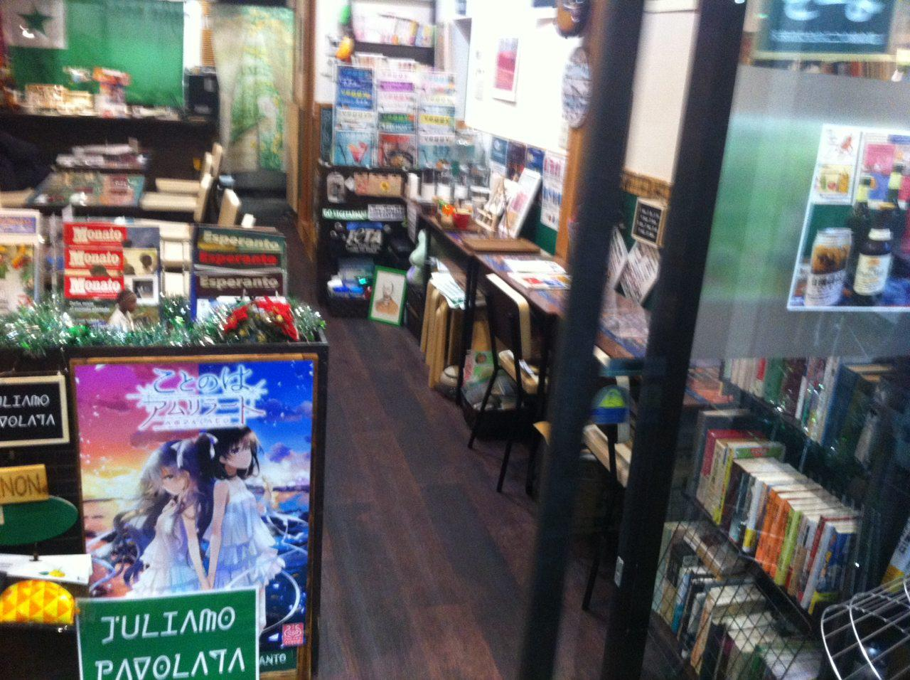 Vegana Esperanto-kafejo SOJO, en Tokio, Japanio.